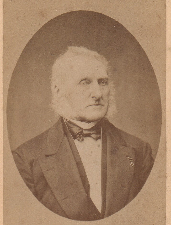 Portret J.J.Hasselman, minister van Kolonien